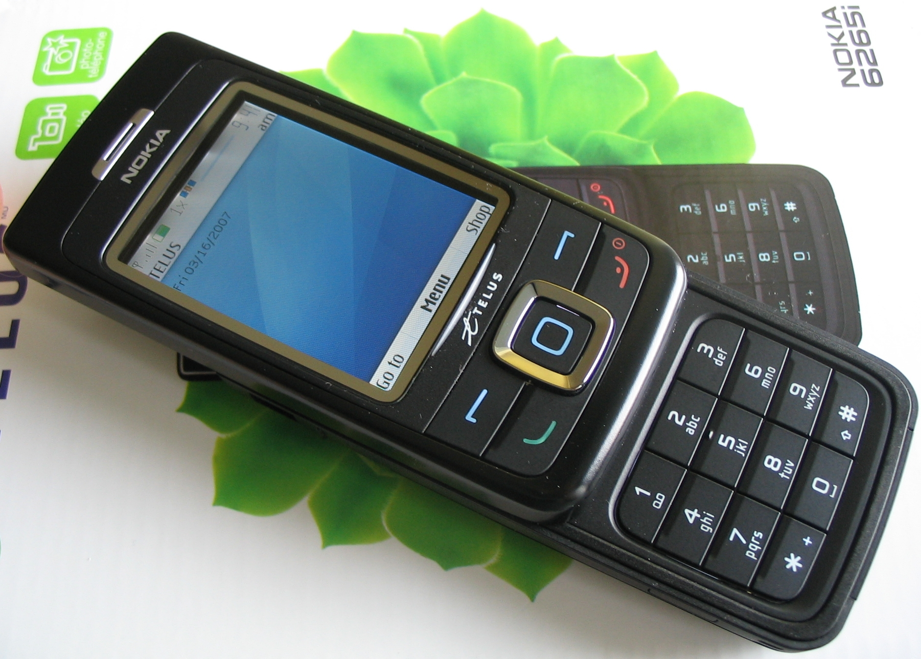 Nokia 6265i